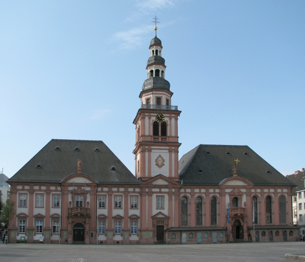 Altes Rathaus und St.-Sebastian-Kirche in Mannheim